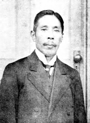 堀田義次郎